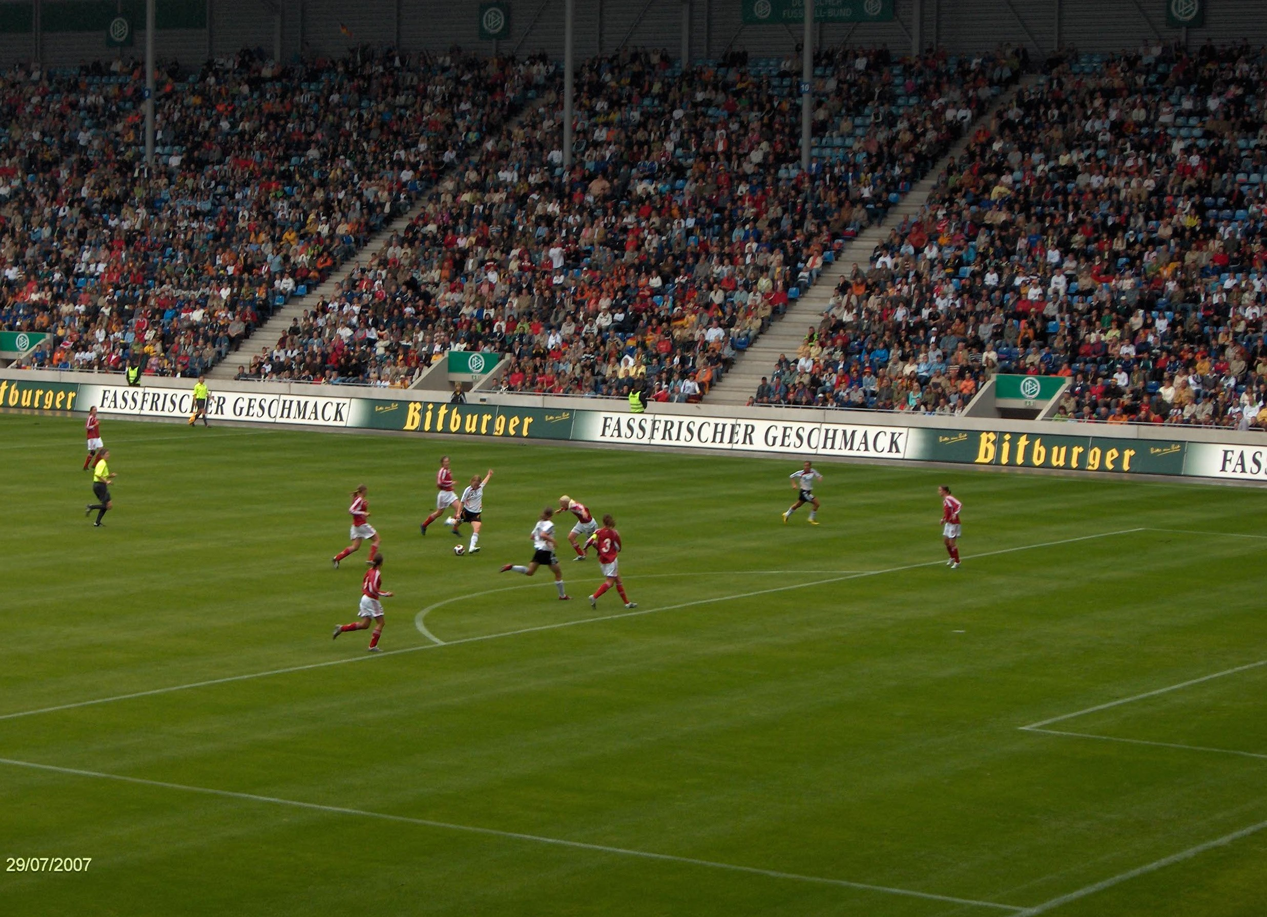 Frauen-Fußballländerspiel Deutschland-Dänemark am 29.07.2007 in Magdeburg: Melanie Behringer schießt aufs dänische Tor. Es ist die Szene, die zum 1:0 für Deutschland führt.